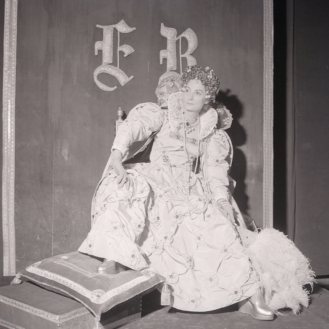 Servizio fotografico : Italia, 1958 / Paolo Monti. - Buste: 15, Fototipi: 15 : Negativo b/n, gelatina bromuro d'argento/ pellicola ; 6x6. - ((Serie costituita da 15 buste di negativi identificati con i nn.: 4728, 4729, 4730, 4731, 4732, 4733, 4734, 4735, 4736, 4737, 4738, 4739, 4740, 4741, 4742, e tenute insieme da una graffetta. - Sulla busta identificata con il n. 4728 iscrizione didascalica manoscritta a penna: "Sarah Ferrati/ in 'Maria Stuarda'".